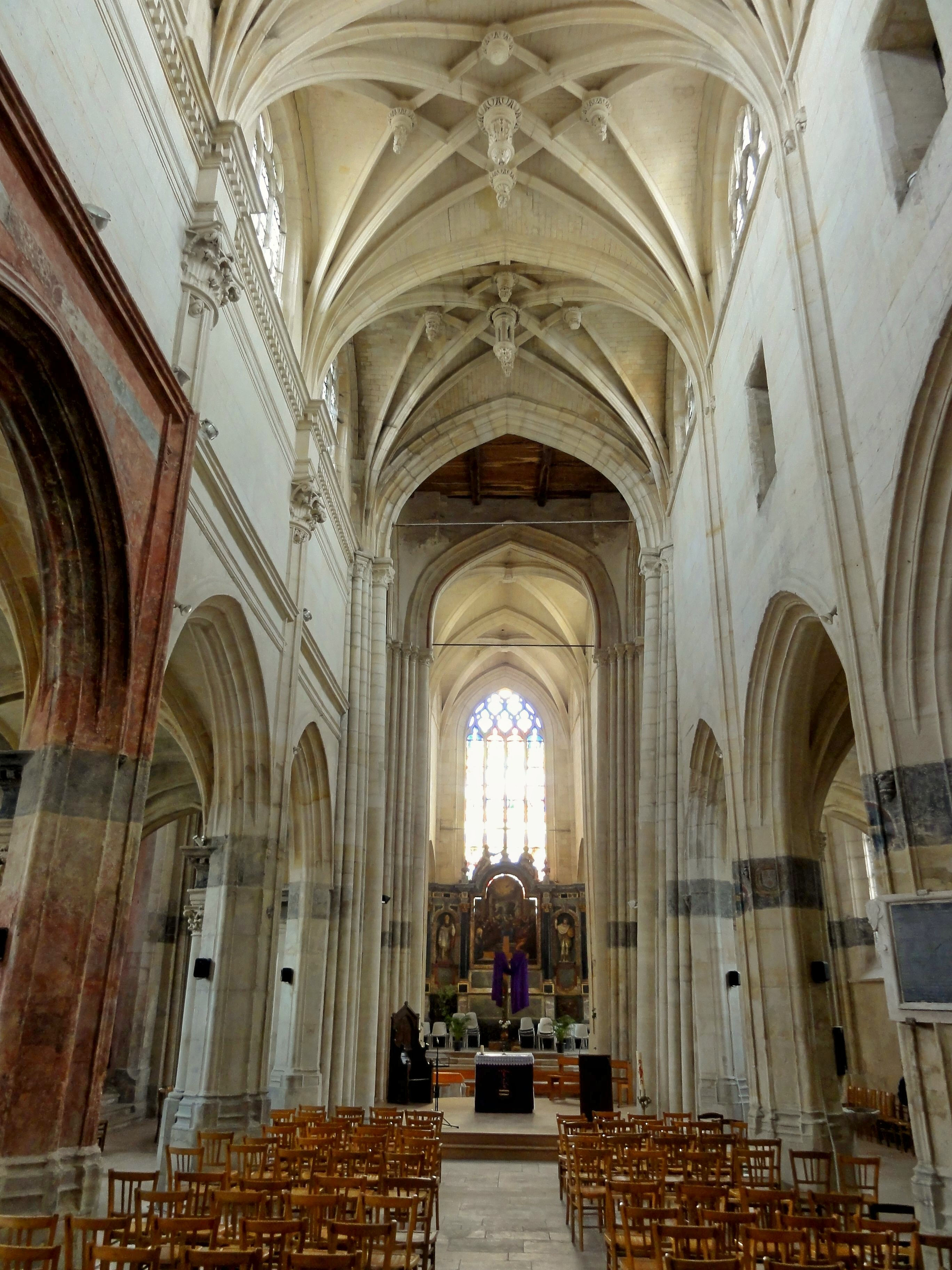 Nef ; vue depuis l'ouest.